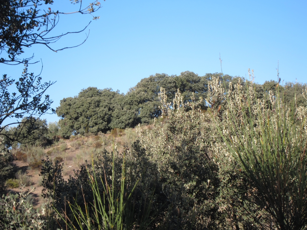 Lagunas de Archidona